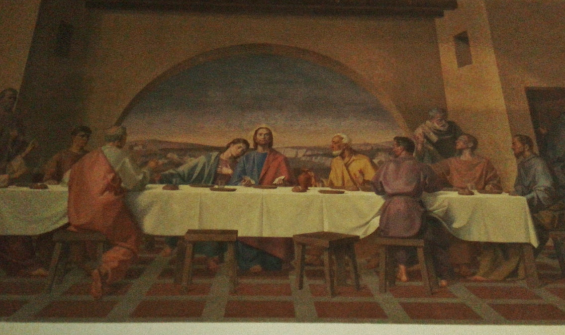 Ultima Cena